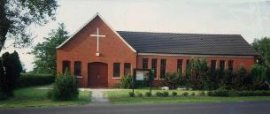 Baptistenkirche Moorhusen